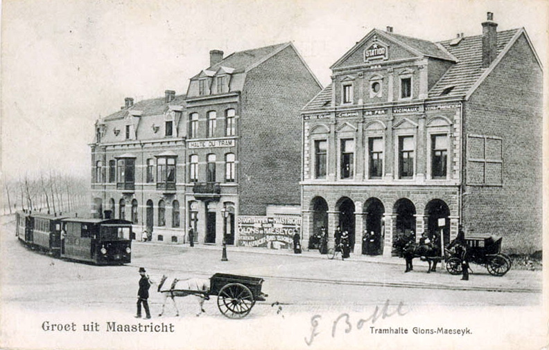 Prentbriefkaart van de stoomtram nabij het tramstation op het Koningin Emmaplein in Maastricht, 1900. Links de Hertogsingel. Het tramstation van de Chemins de Fer Vicinaux was bestemd voor reizigers naar Glons (Glaaien) of Maaseik en tussenliggende plaatsen. Op Marktdagen puilde het trammetje uit met bezoekers van buiten. De verwarming bestond uit een potkacheltje met daarnaast een kolenbak, die door de passagiers gebruikt werd. Fotocollectie RHCL Maastricht, GAM 12711.